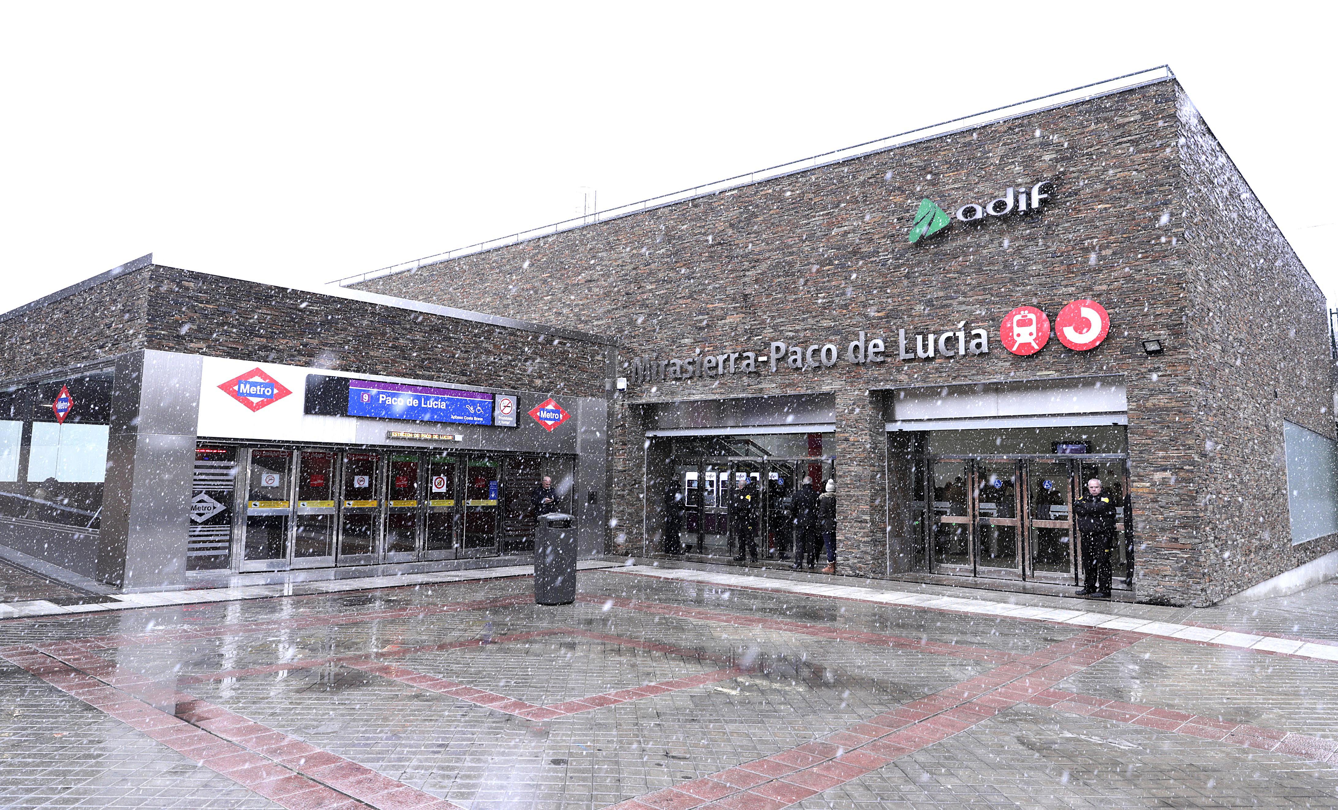 La estación de Cercanías de Mirasierra-Paco de Lucía conecta con la línea 9 de Metro de Madrid.